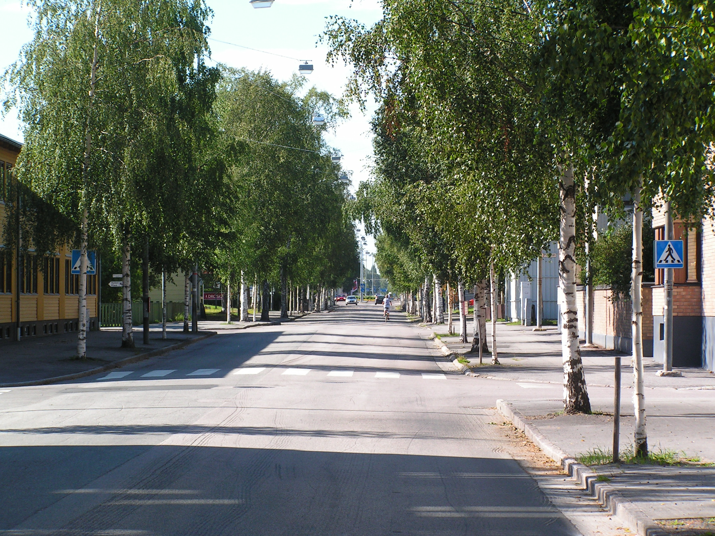 Storgatan (Main street), Umeå, Sweden